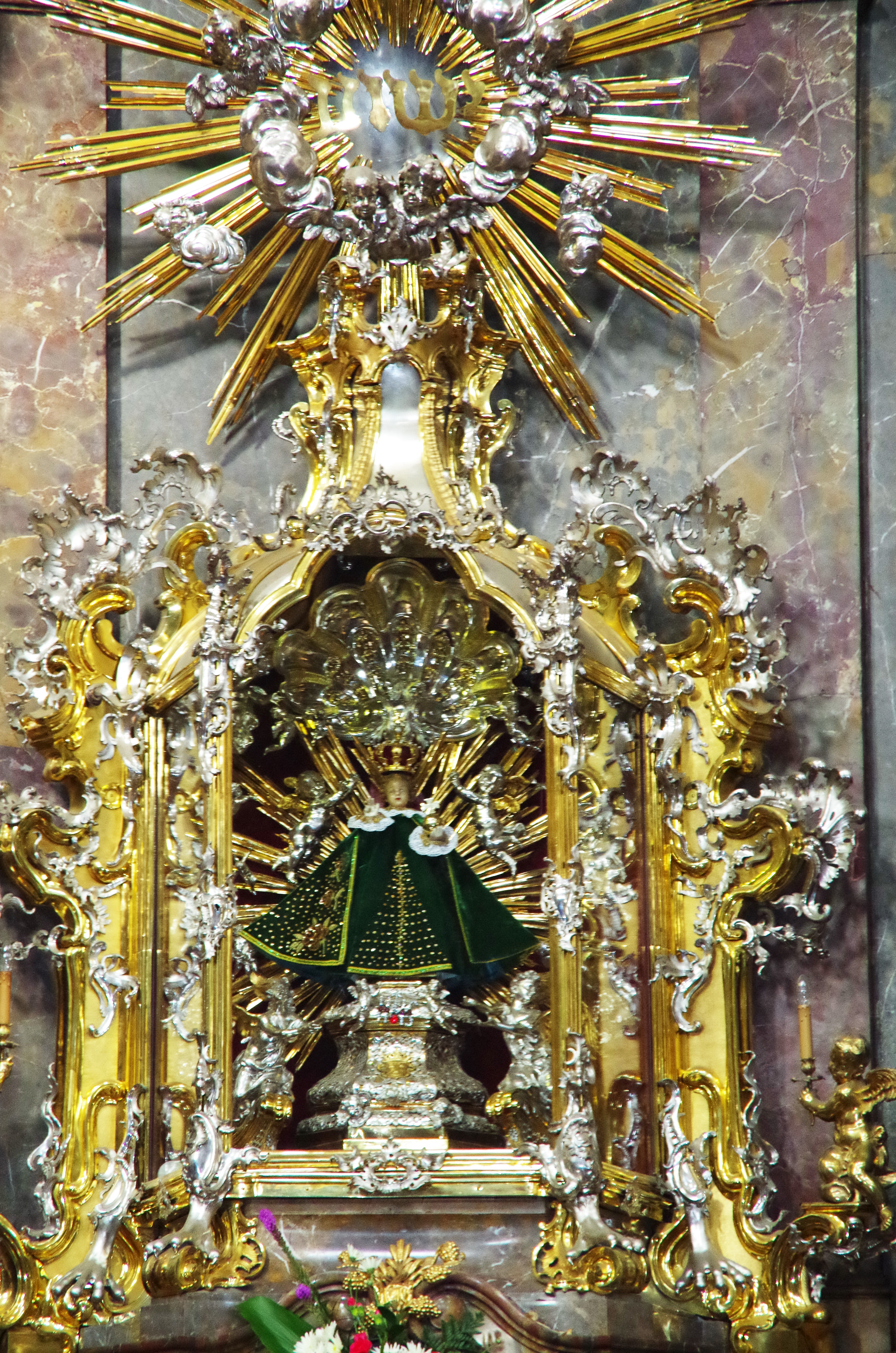 Altar mit Prager Jesulein